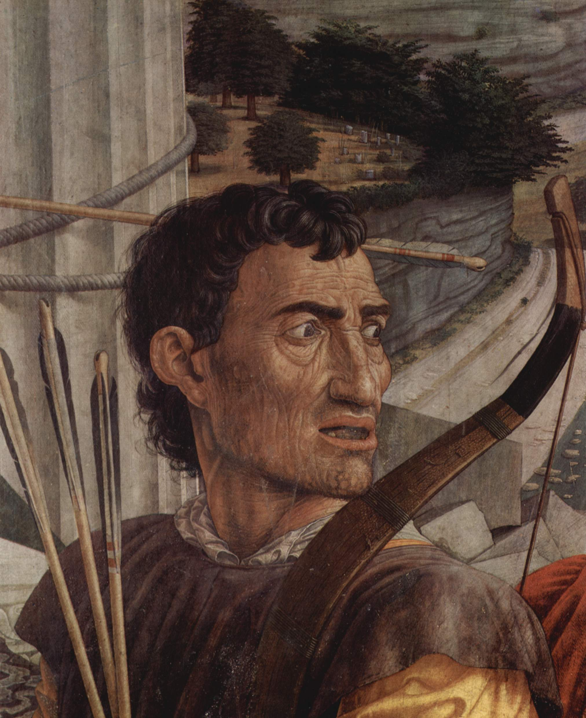 detail: Kopf eines der Bogenschützen